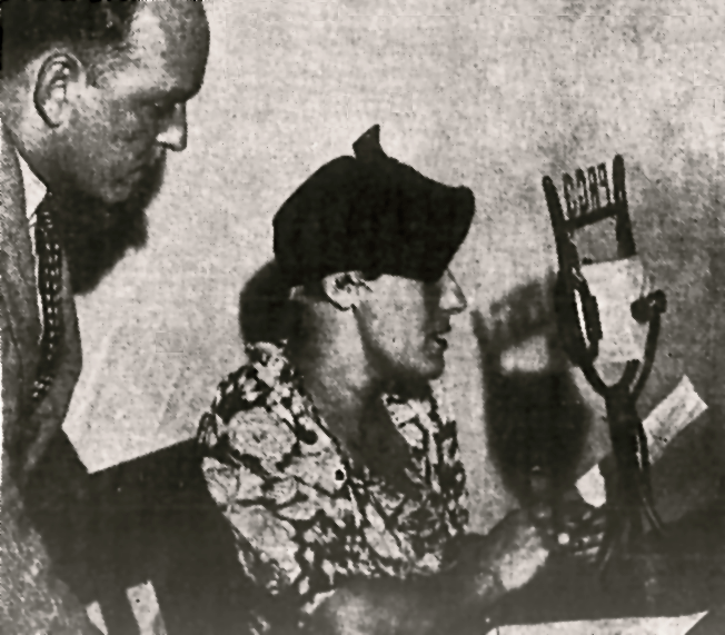 A piloto francesa Hellé Nice dá entrevista à Rádio Tupi, no Rio de Janeiro, 1936.